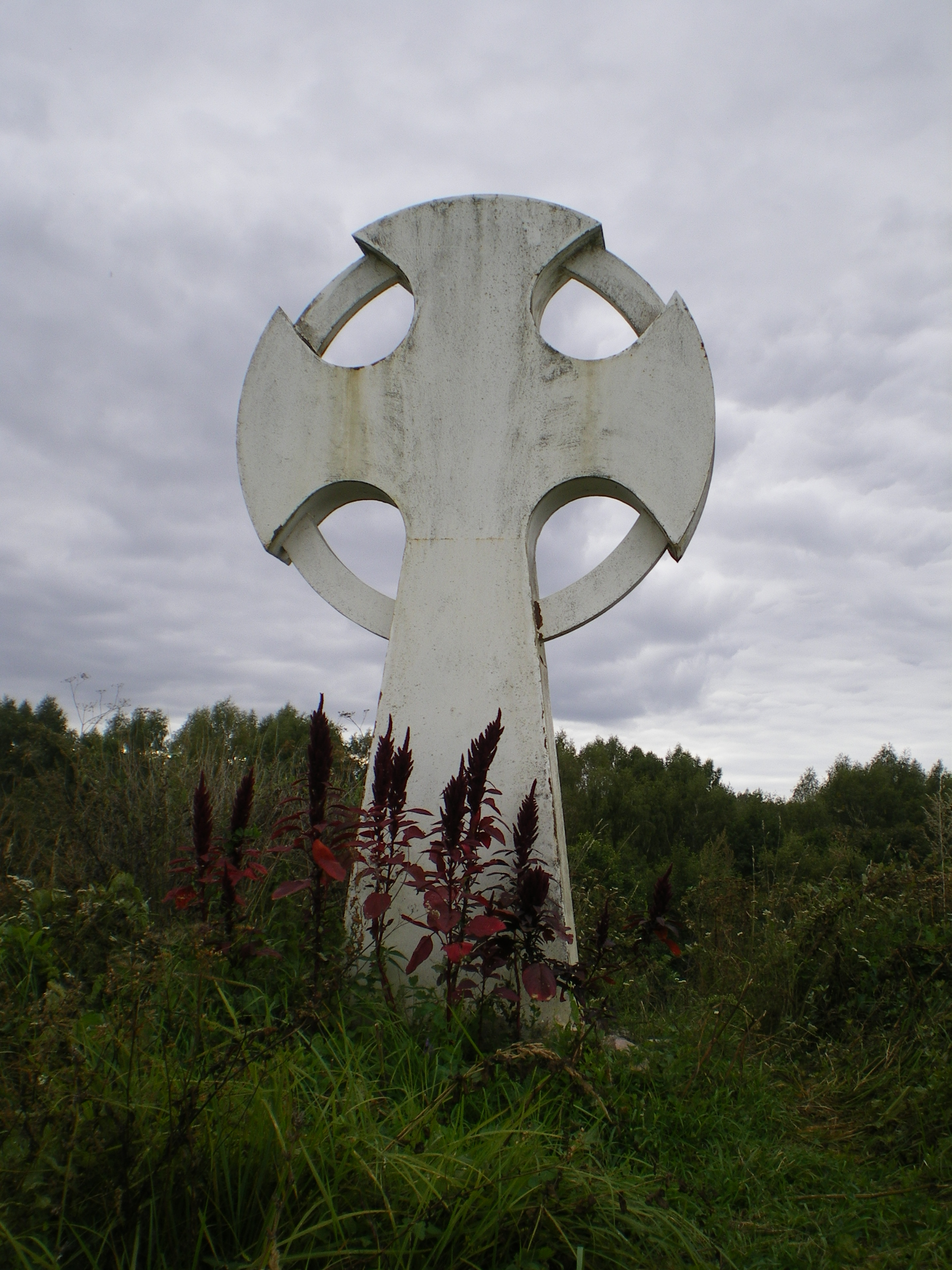 Крест, на месте древнерусского храма на детинце Вщижа.